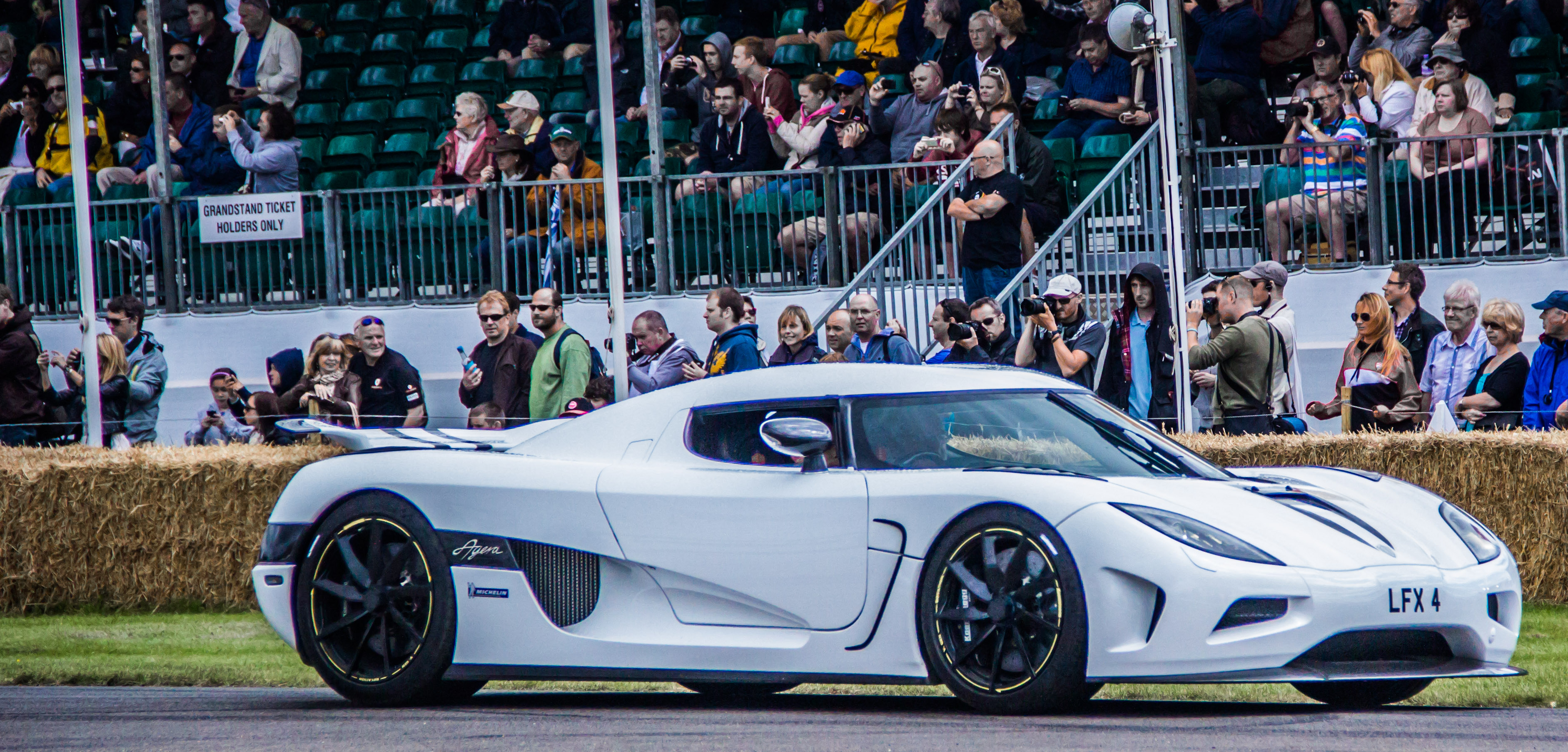 Agera